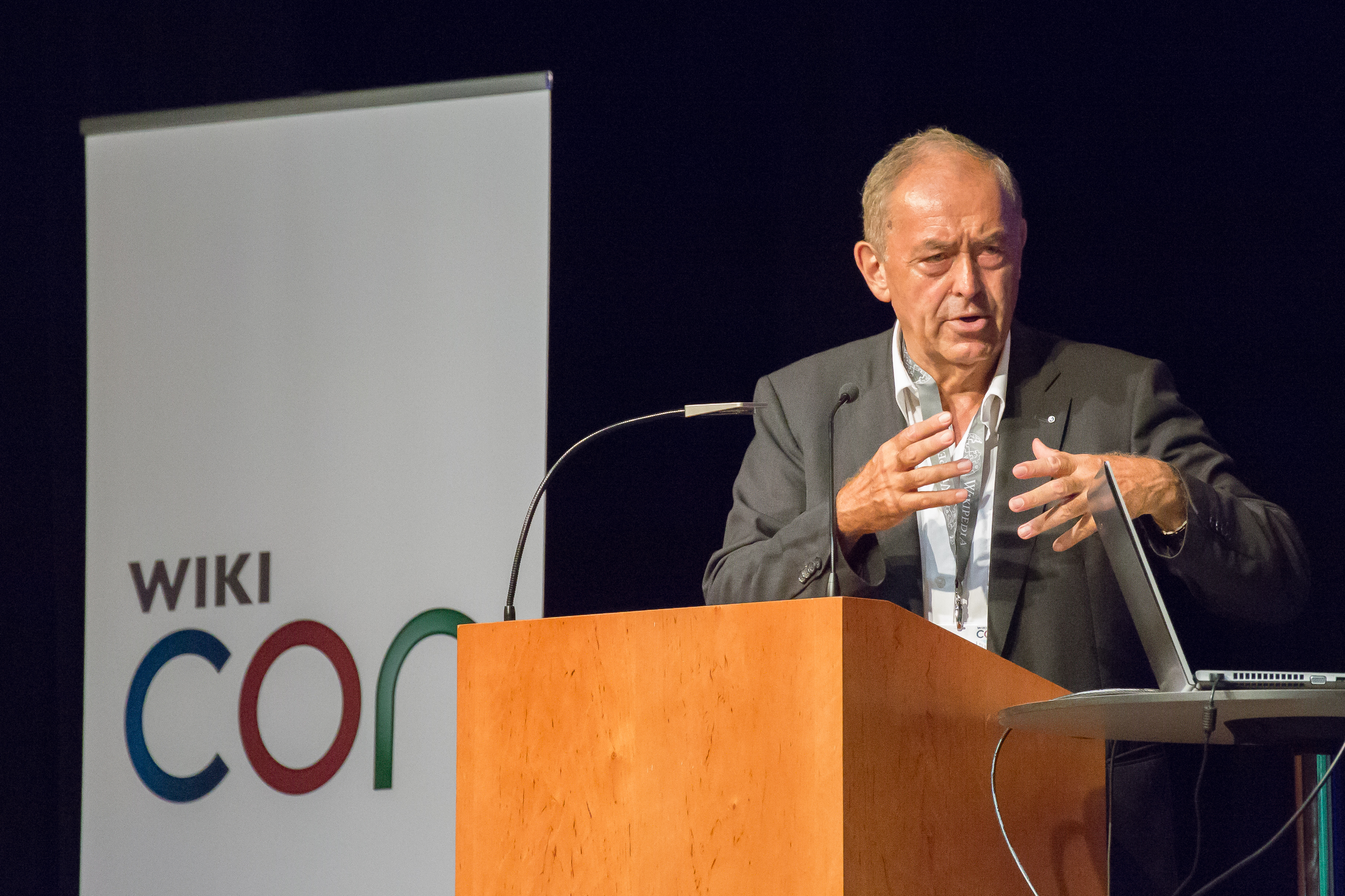 "Wissensmanagement und Intelligenz von Superorganismen" ein Vortrag von Franz Josef Radermacher auf der WikiCON 2016